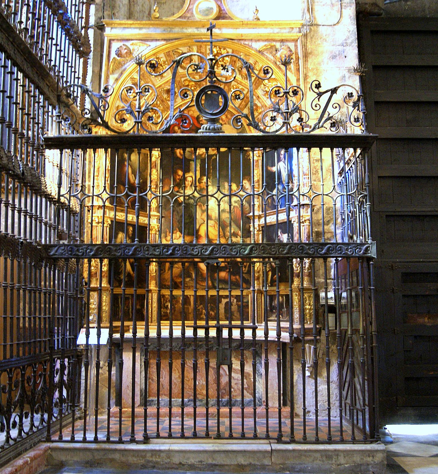 Altar del Nacimiento de la catedral de Sevilla, (España).